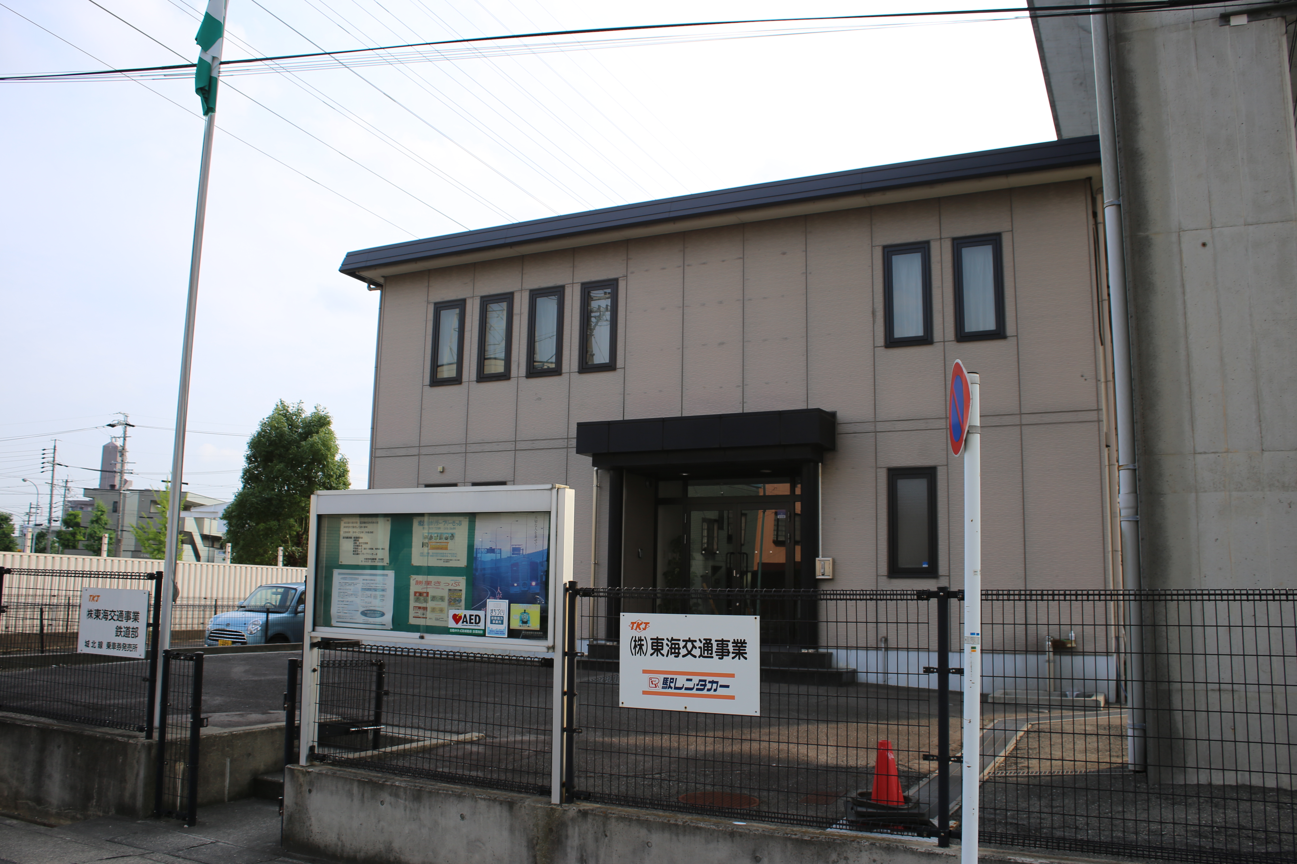 名古屋市西区八筋町の東海交通事業（TKJ）本社を東側公道北側より撮影